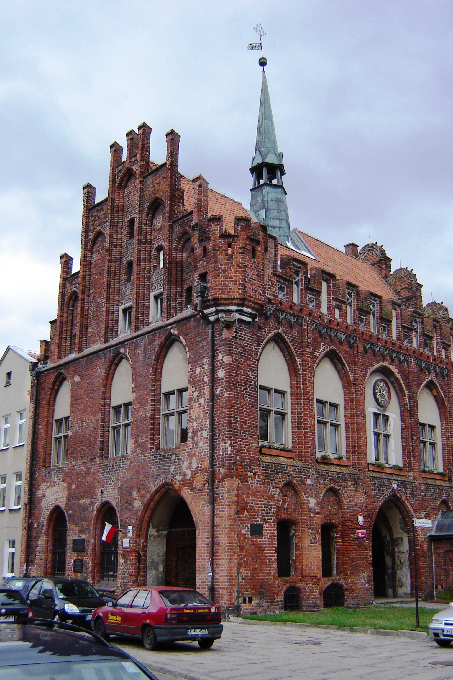 Ratusz w Malborku